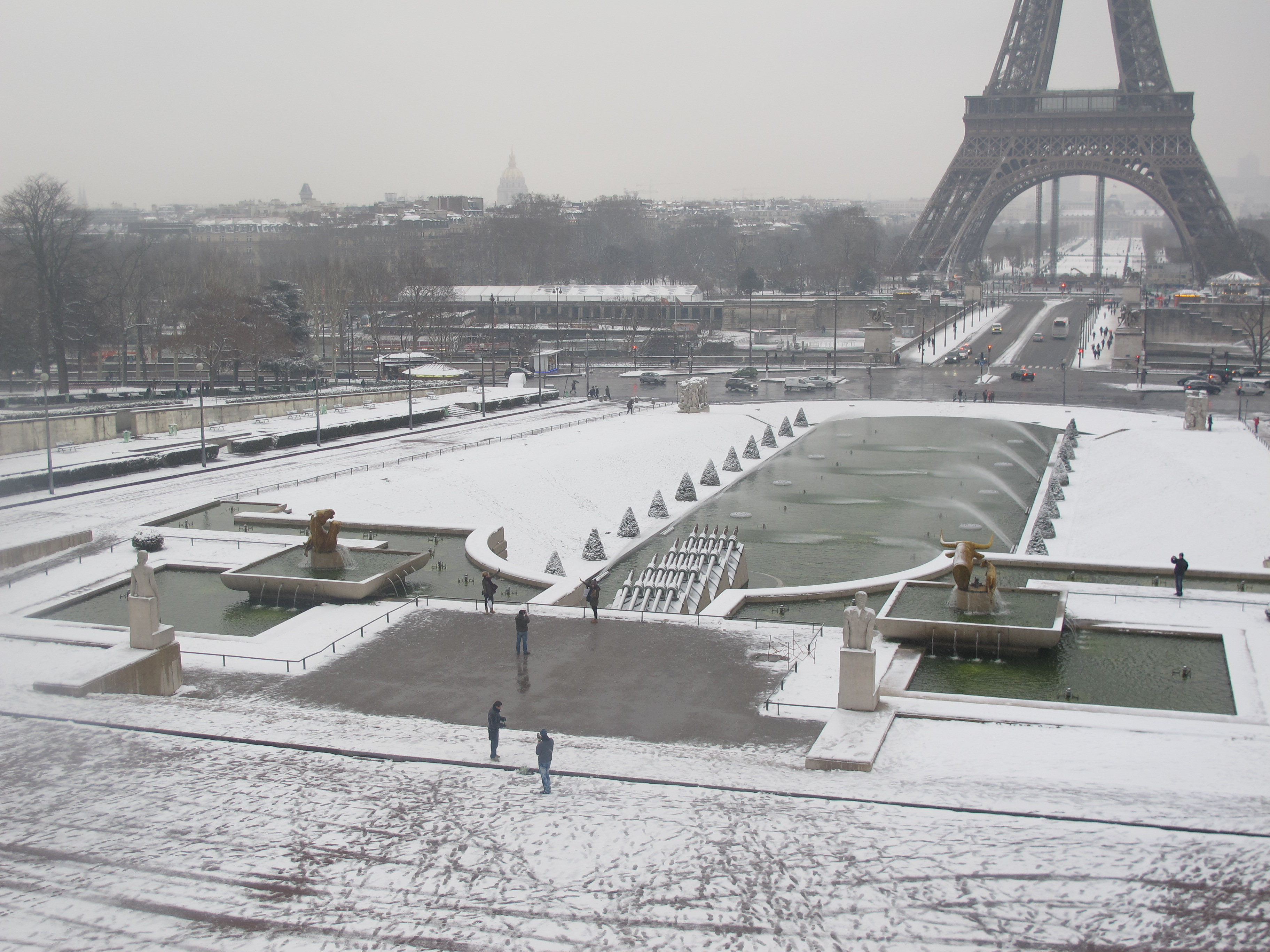 La fontaine du Trocadéro avec la tour Eiffel, sous la neige.